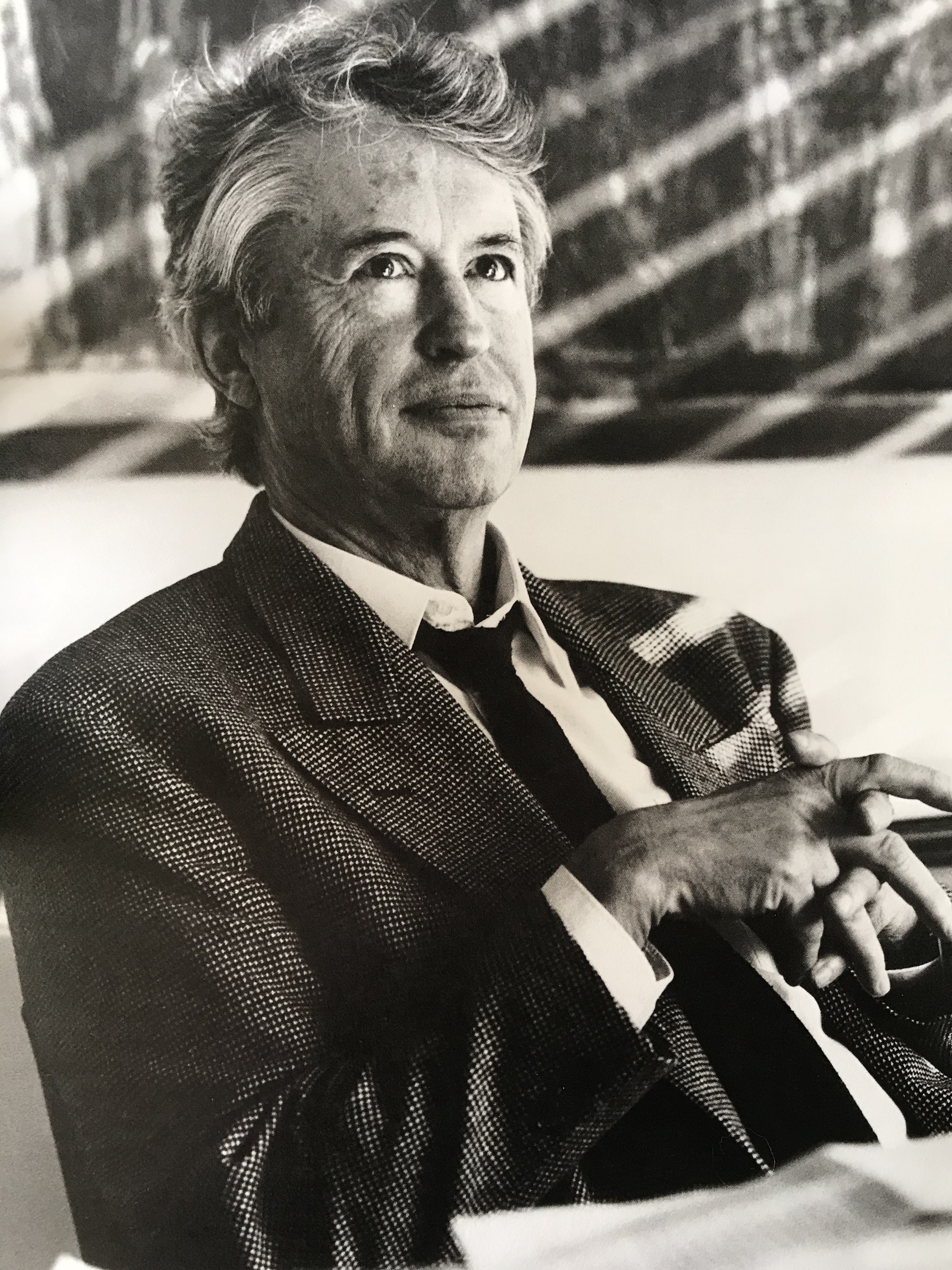 Prof. Dieter Welzel